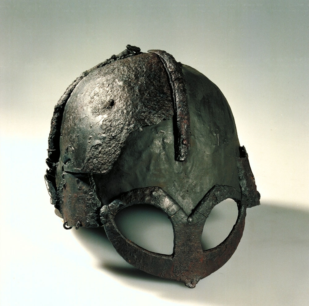 Hjelm av jern fra vikingtid fra Gjermundbu, Ringerike, Buskerud. Historisk museum, Kulturhistorisk museum, UiO